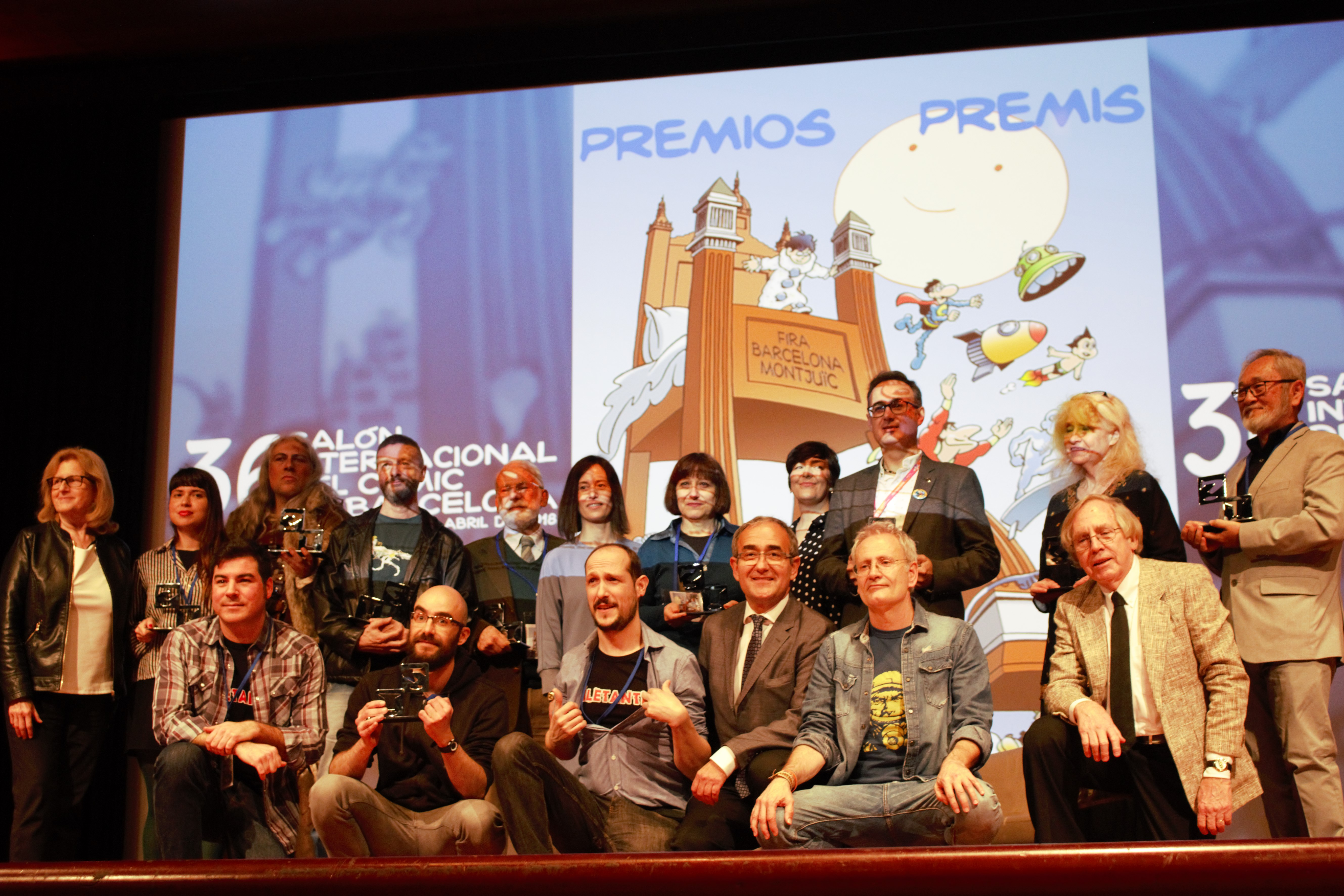 Foto de grup de tots els autors homenatjats i guanyadors dels premis de la 36a edició del Saló Internacional del Còmic de Barcelona.